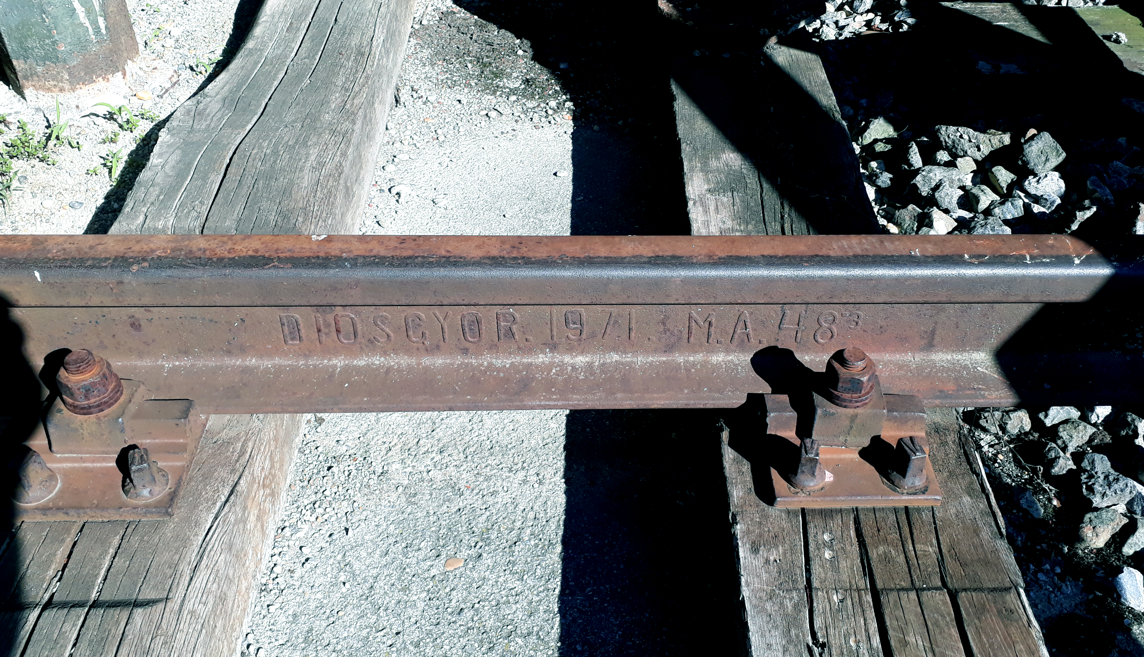 Schiene mit der Walzmarke des Stahlwerkes Diósgyőr 1971 M A 48 ³. Alter Bahnhof Mönchhof-Halbturn der Raab-Ödenburg-Ebenfurther-Eisenbahn, Strecke Neusiedlerseebahn, im Burgenland, Österreich (Teil des Dorfmuseums in Mönchhof).